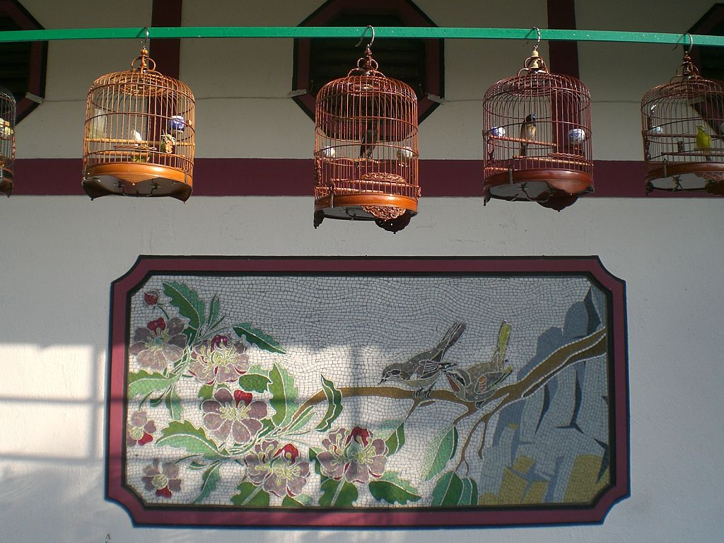 旺角園圃街雀鳥花園